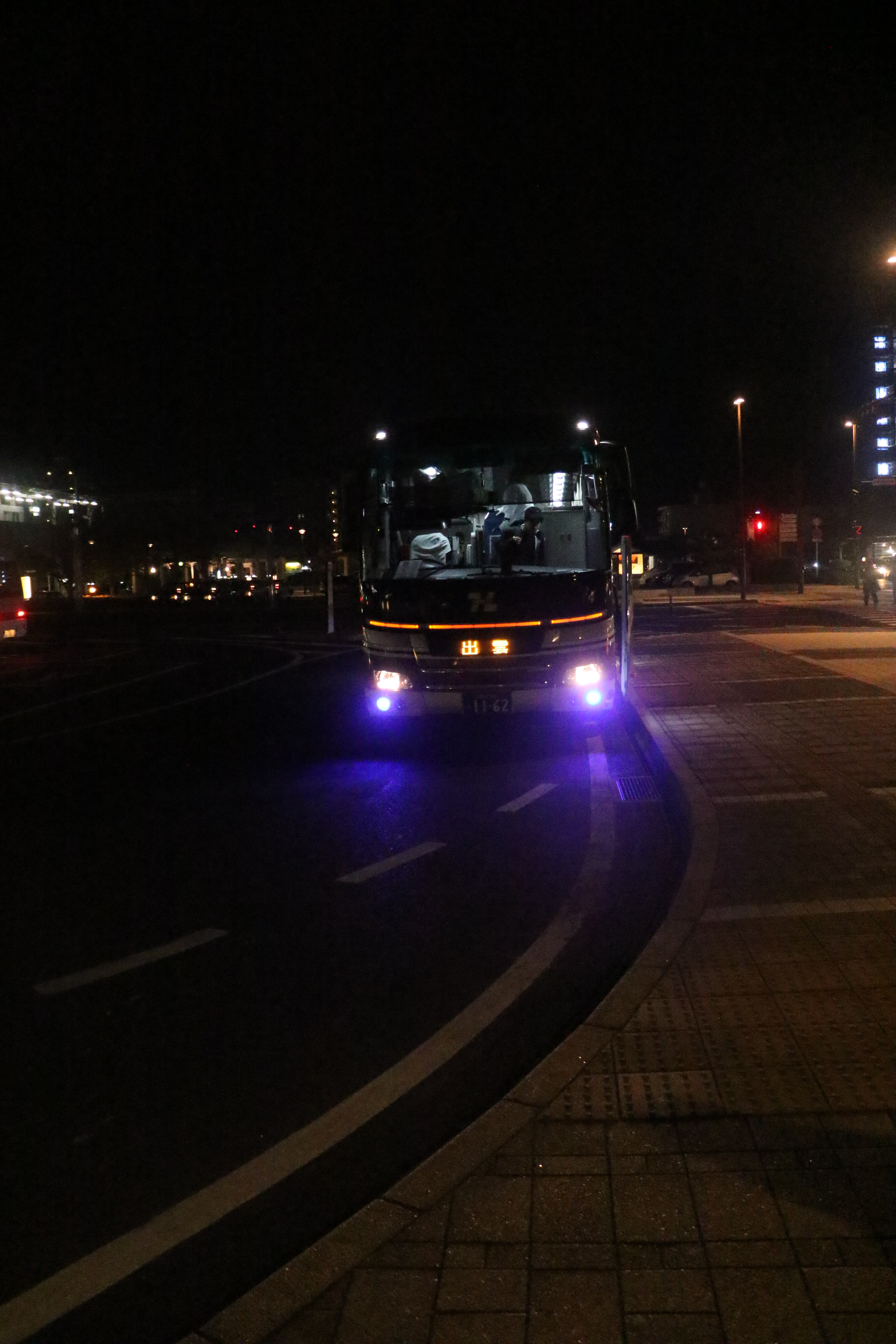 阪急バス 高速車 くにびき号 松江・出雲行き 1165号車 西日本車体工業 ネオロイヤルＳＤ－Ⅱの代替えとして、登場した。